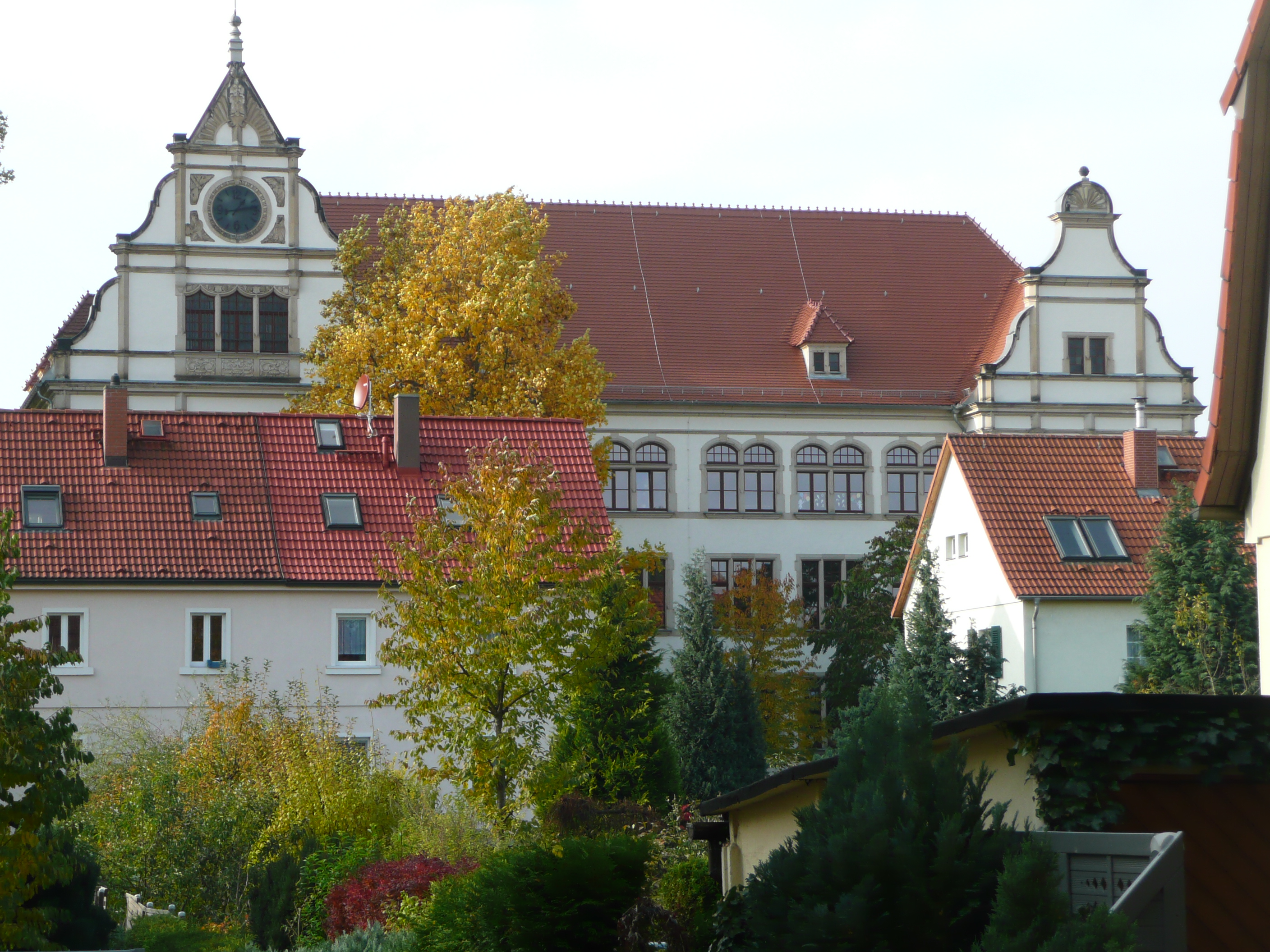 Schule Trachau Böttgerstraße von Stephanstraße